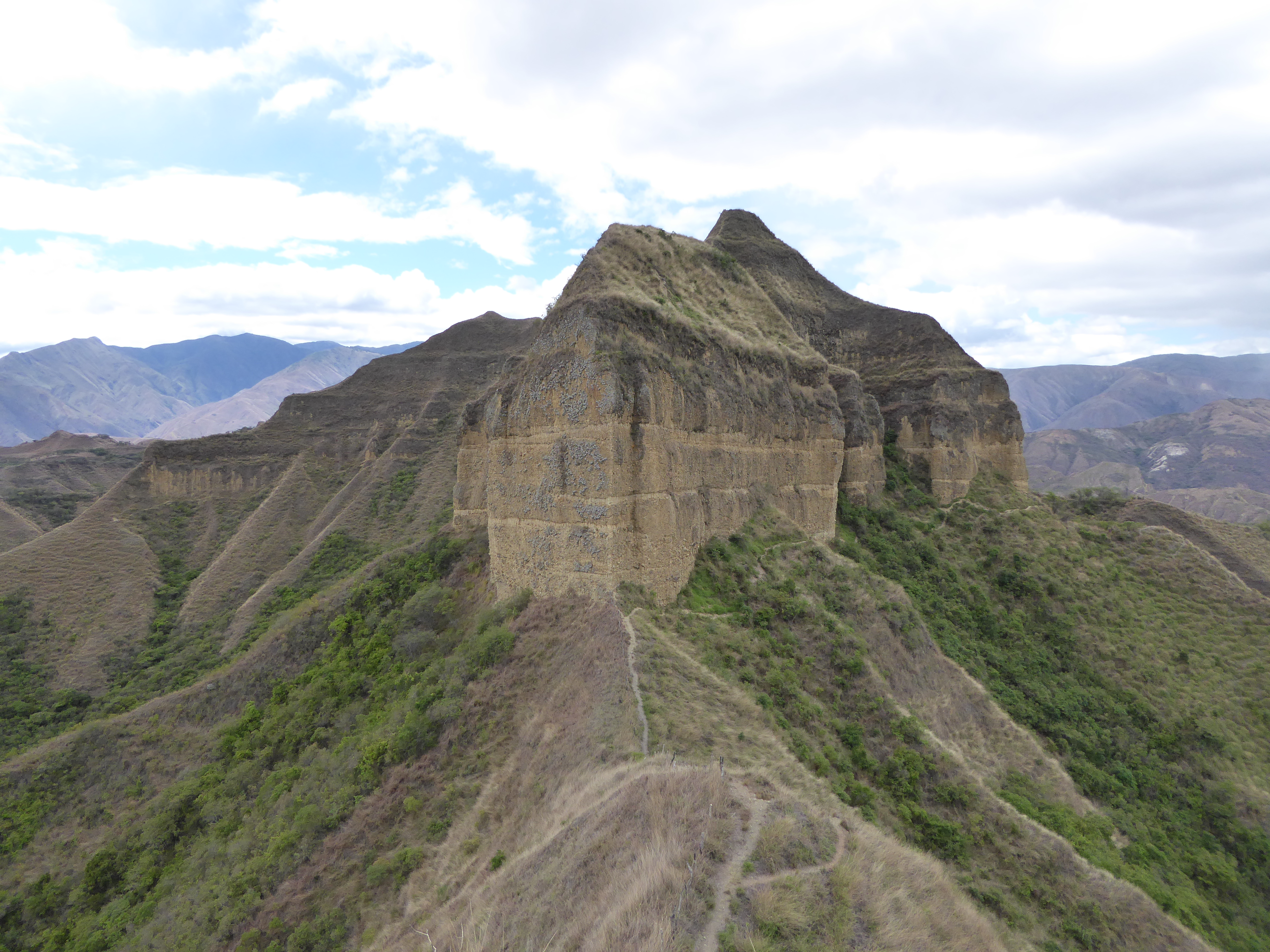 Auf dem Mandango Trail